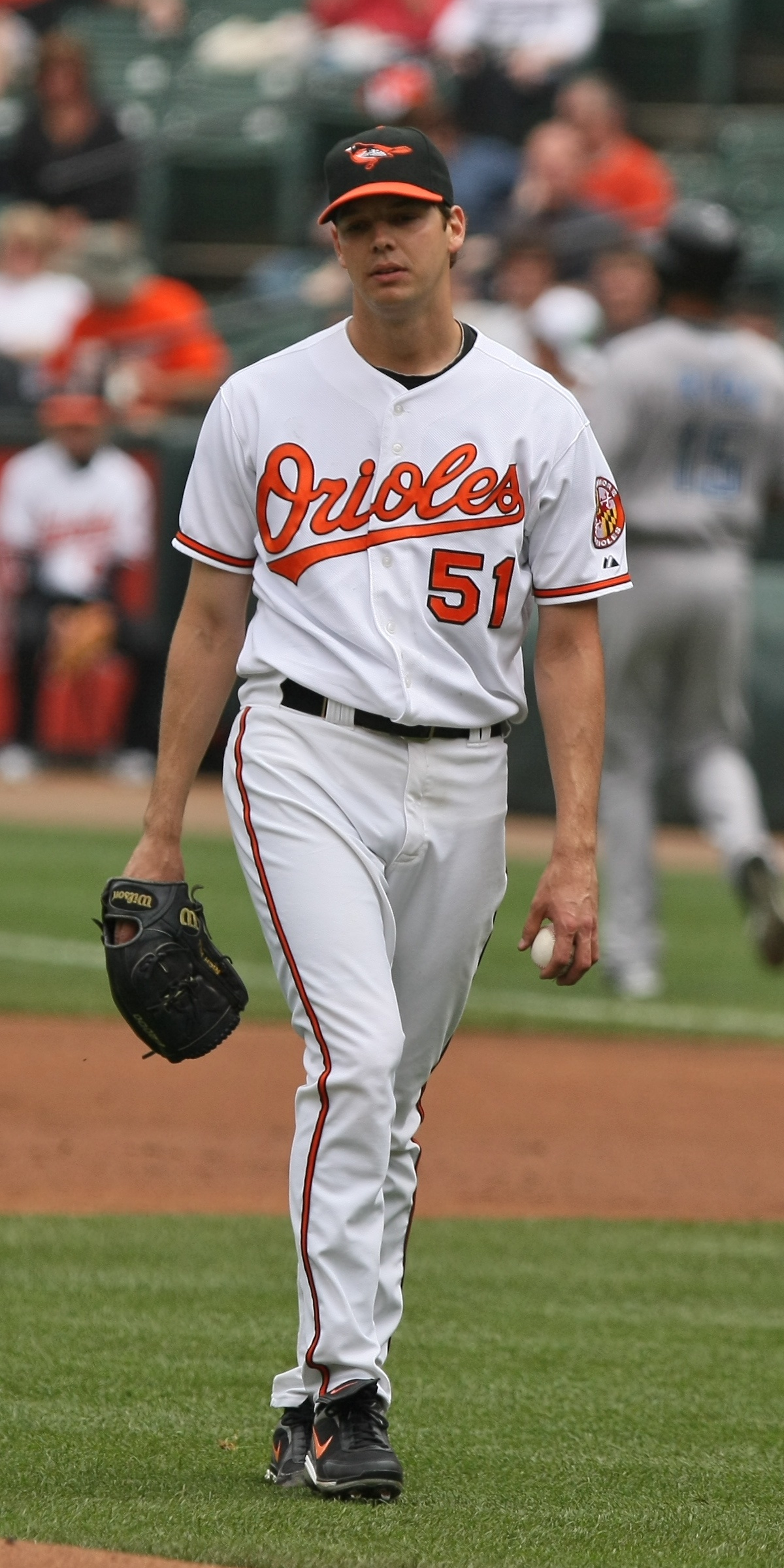 Rich Hill